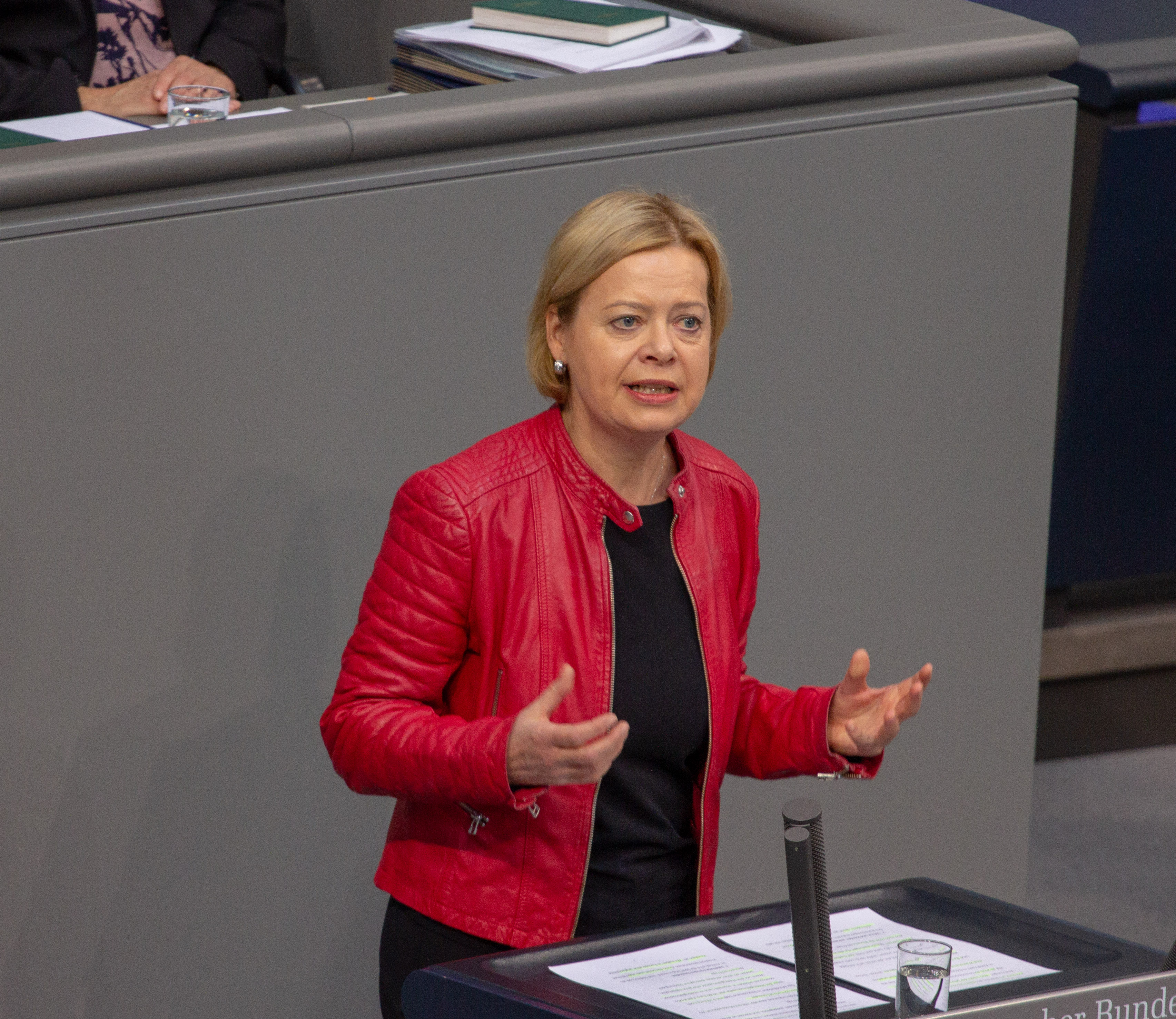 Gesine Lötzsch, Mitglied des Deutschen Bundestages, während einer Plenarsitzung am 11. April 2019 in Berlin.